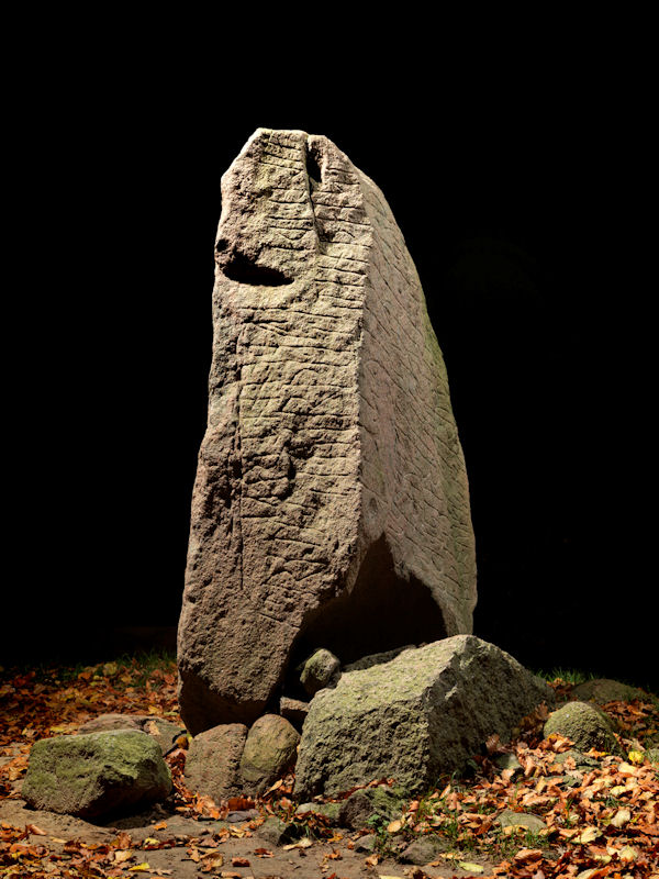 Foto af Roberto Fortuna